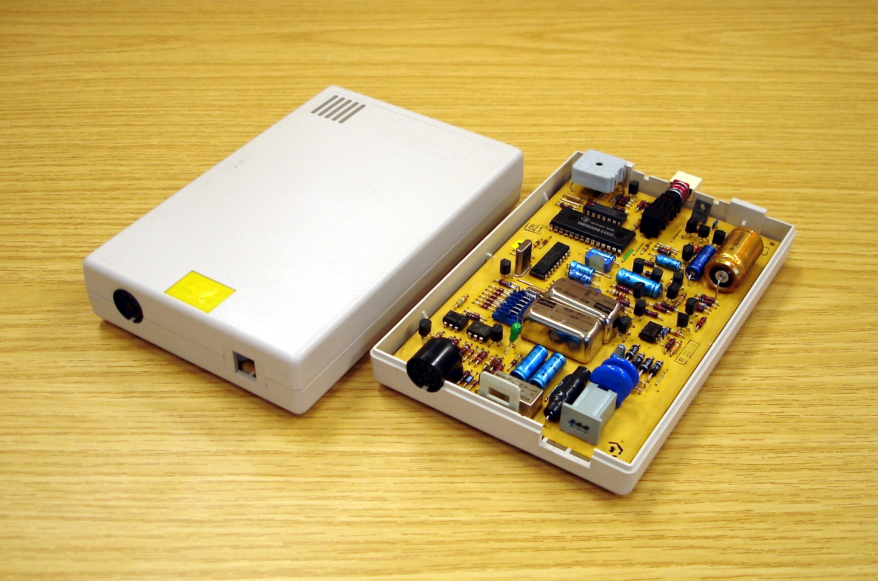 Das erste Modem für BTX. Übertragungsgeschwindigkeit: 1200/75 B/sek Besonderheiten: Eine gelbe Plombe zeigt ein Originalgerät, bei einer blauen wurde es geöffnet. Hersteller: Verschiedene